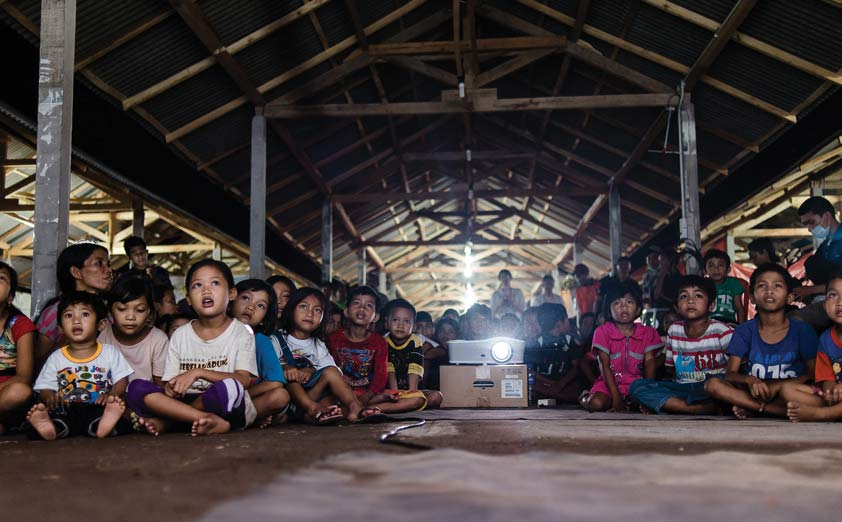 Dokumentasi Popup Cinema Minikino Film Week